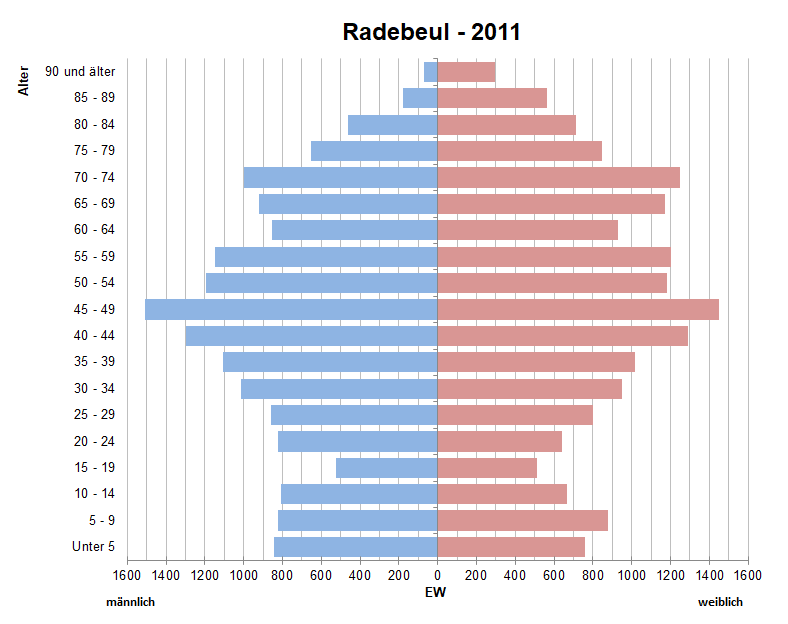 Bevölkerungspyramide der Stadt Radebeul nach Zensus 2011.